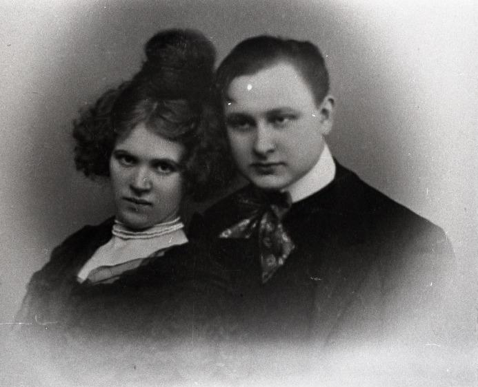 "Estonia" teatri näitlejad, abielupaar Netty ja Paul Pinna 1908. aastal